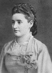 Ritratto di Bertha Pappenheim (Anna O.) Considerata la biografia del soggetto, l'immagine risale certamente al decennio 1890-1900, si trova diffusa in numerosi esemplari e in piÃ¹ formati di stampa tra i quali una cartolina in mio possesso priva di indicazioni di privilegio e con timbro postale del 1958.